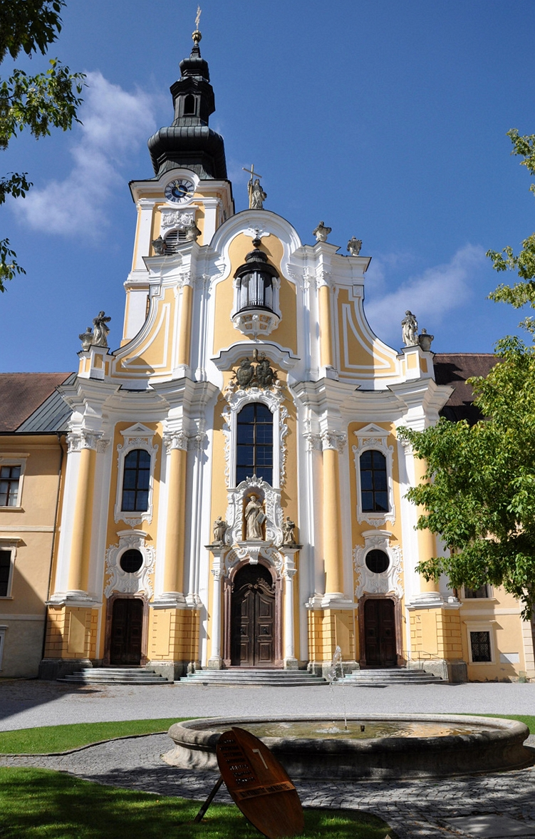 Die Außenfassade der Stiftskirche von Rein